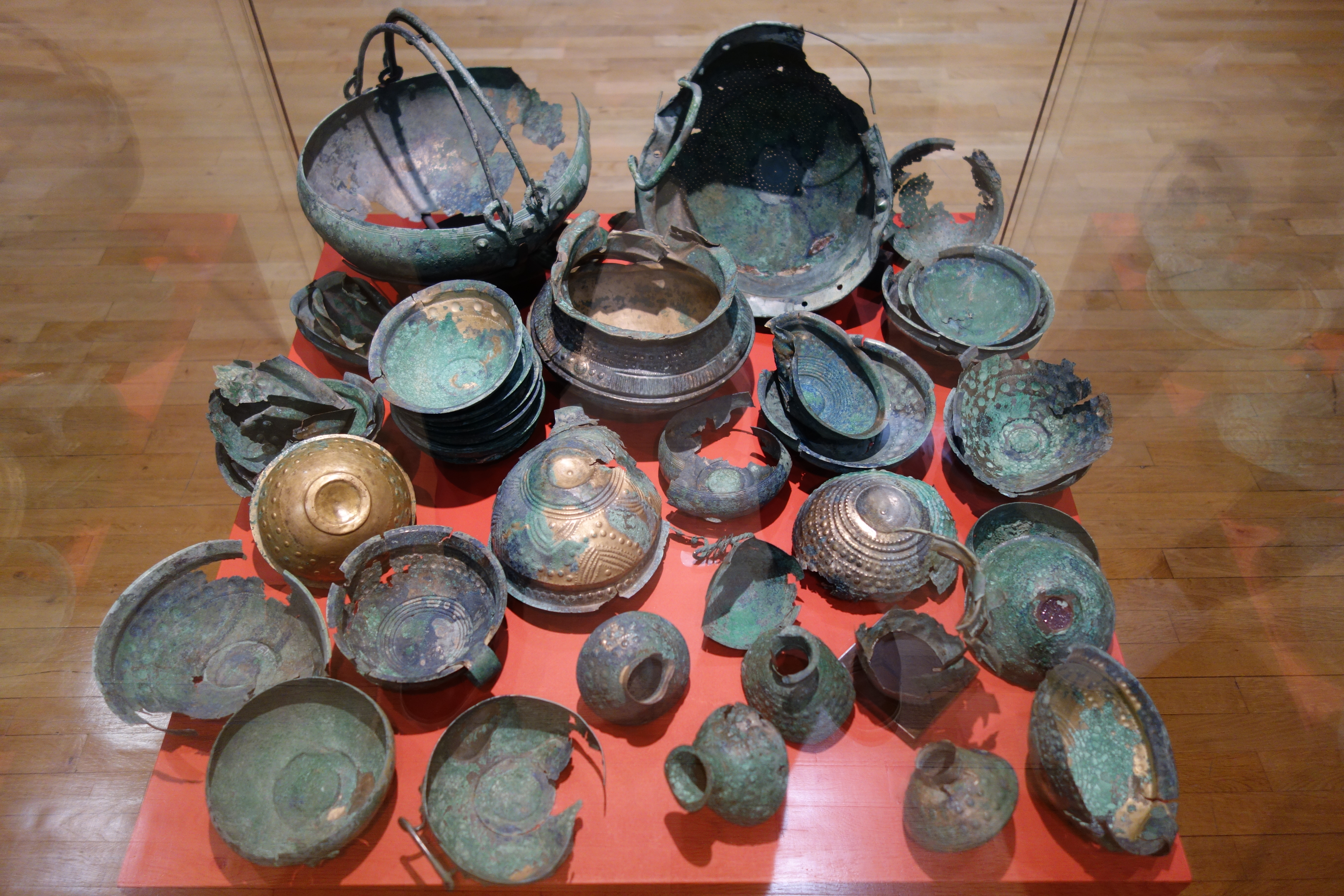 Dépôt de vaisselle de bronze d'Évans exposé au Musée de Lons-le-Saunier dans l'exposition « Bric-à-Brac pour les dieux ? »